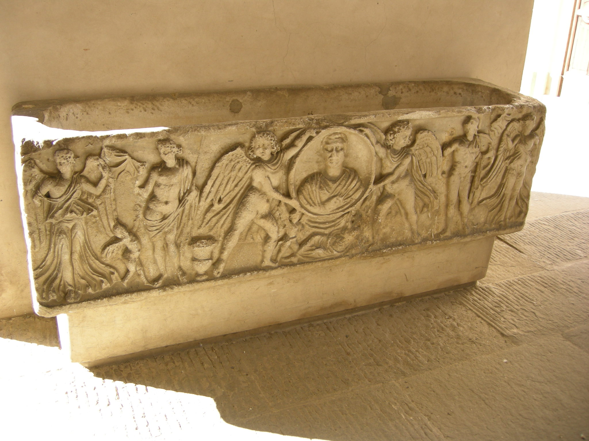 Villa di poggio a caiano, sarcofago romano